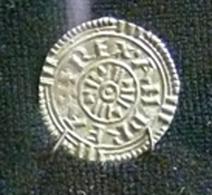 Denár Ondřeje I.